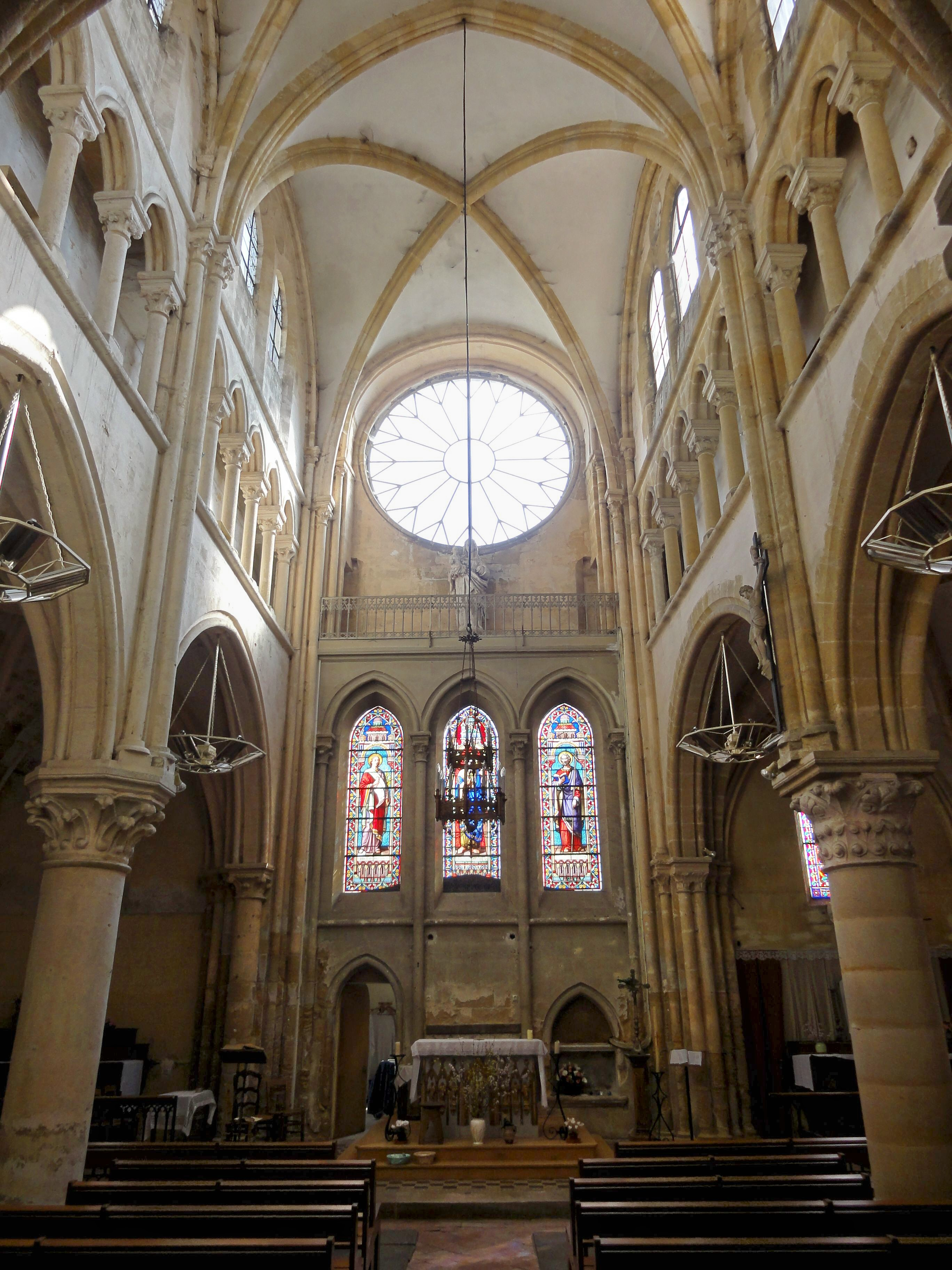 Vue générale intérieure depuis l'entrée.